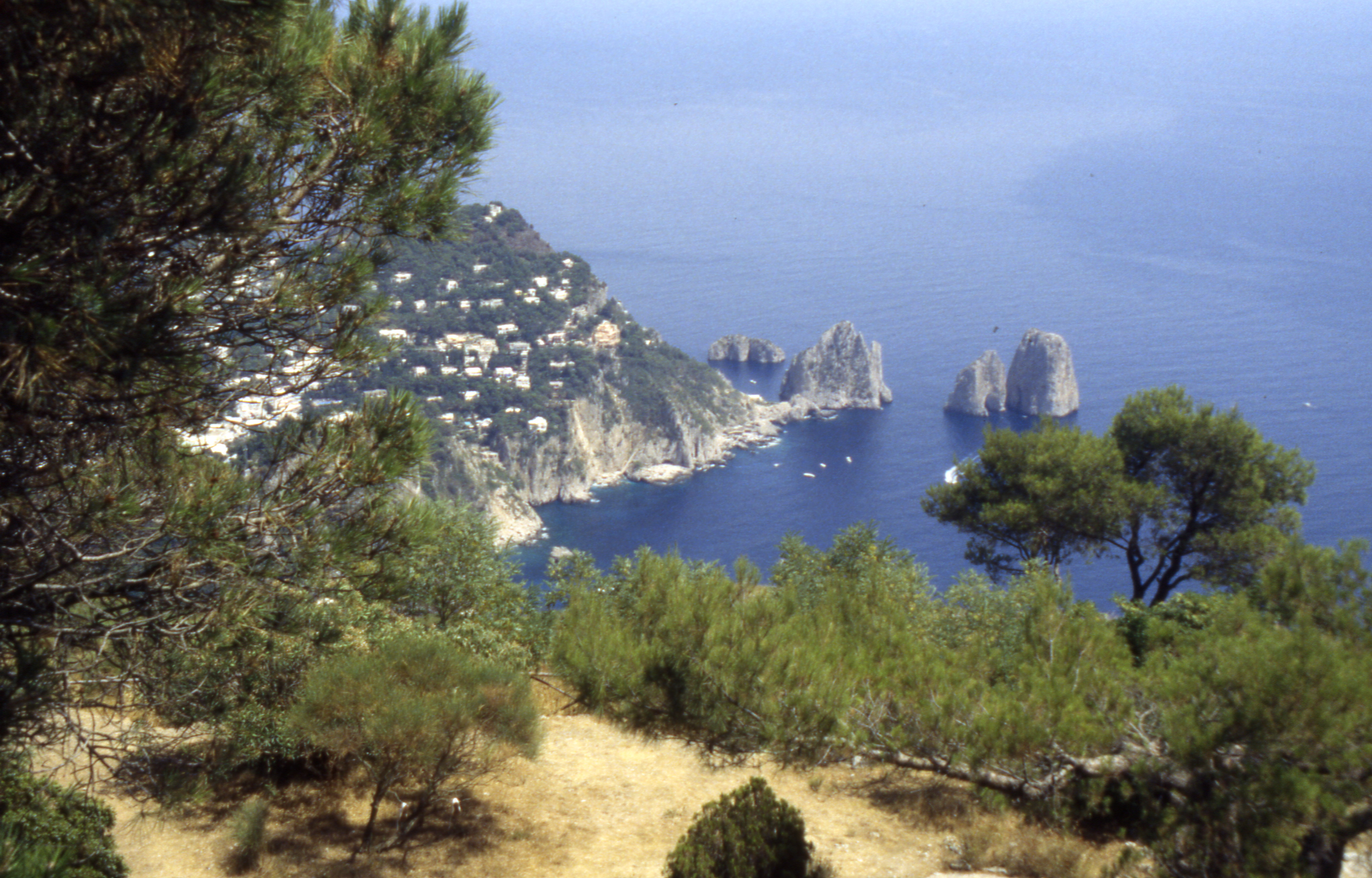 Capri Ansicht